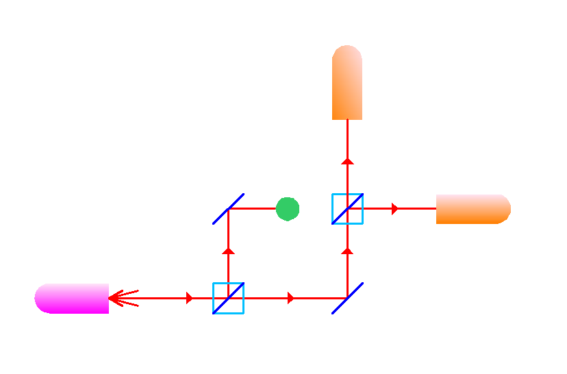 Elitzur-Vaidman - Experiment mit Objekt im Strahlengang